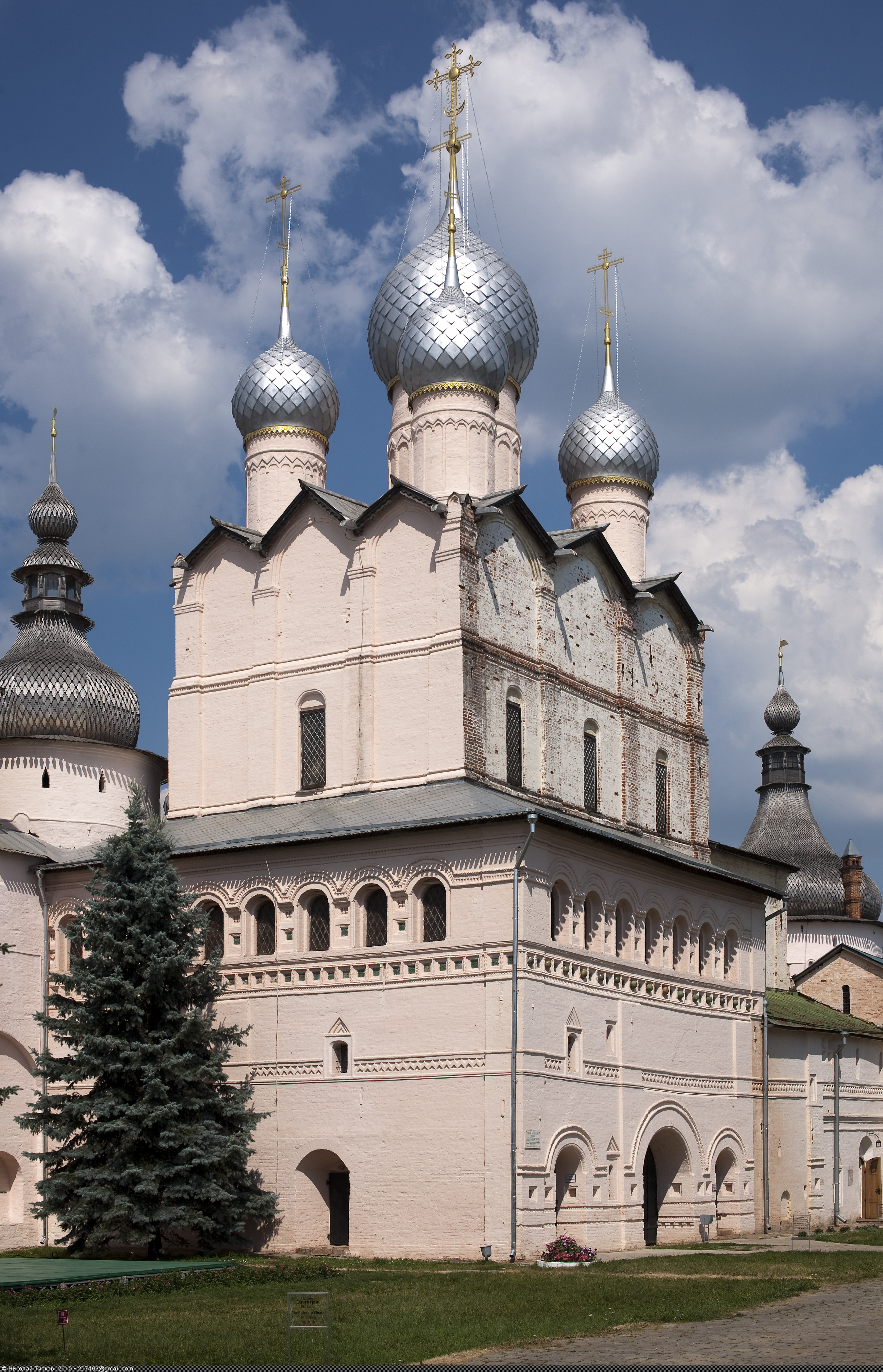 Церковь Воскресения Христова комплекса Ростовского кремля. Каменная надвратная пятиглавая церковь. Построена около 1670 года.